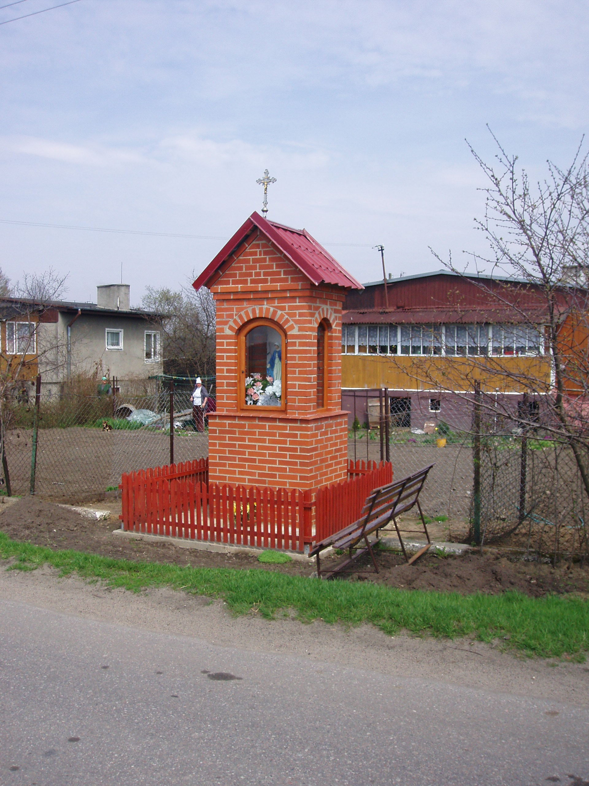 Kapliczka przydrożna w Bałdach